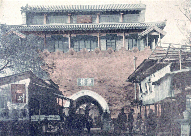 北京昌平谯楼旧照，由日本摄影师摄于20世纪30年代。